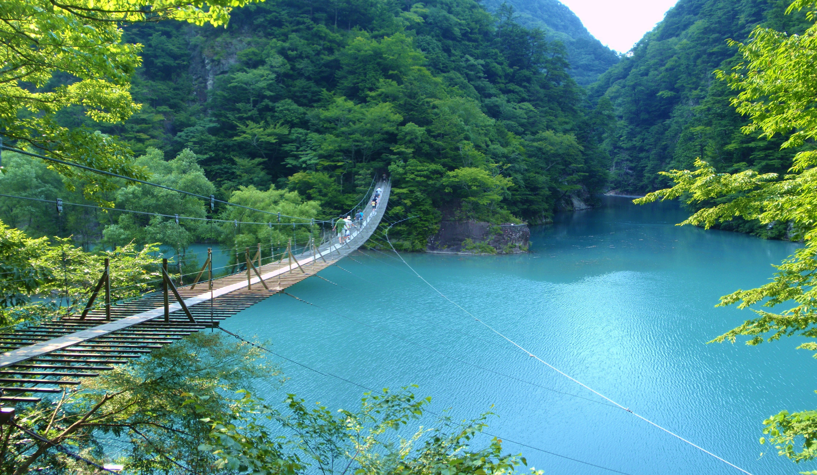 大間ダム湖と夢の吊橋。